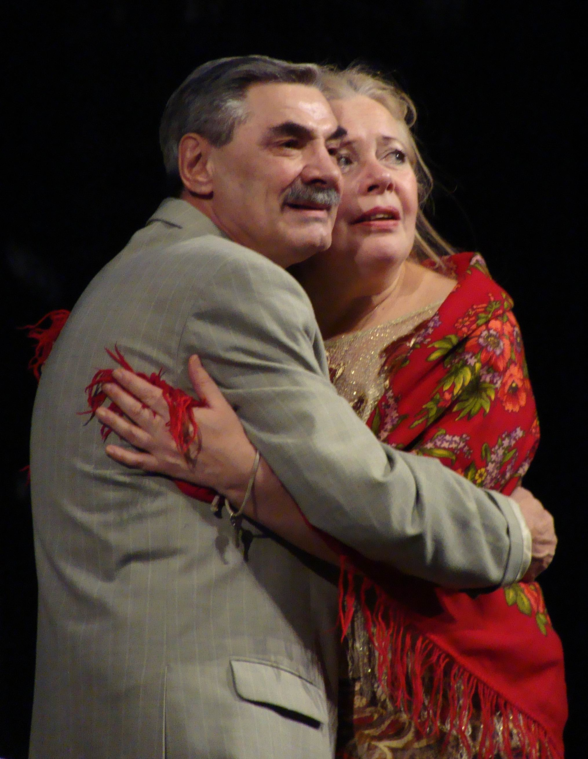 Лирическая комедия Наталии Демчик "Заложники любви". Режиссёр-постановщик Геннадий Шапошников, Продюсер Александр Постников.